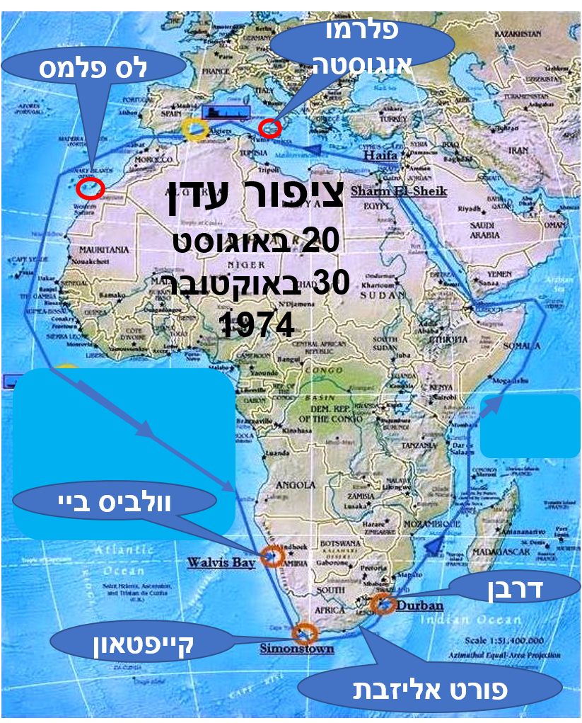 הפלגת ציפור עדן הנחתות מאשדוד לאילת אוגוסט-אוקטובר 1974